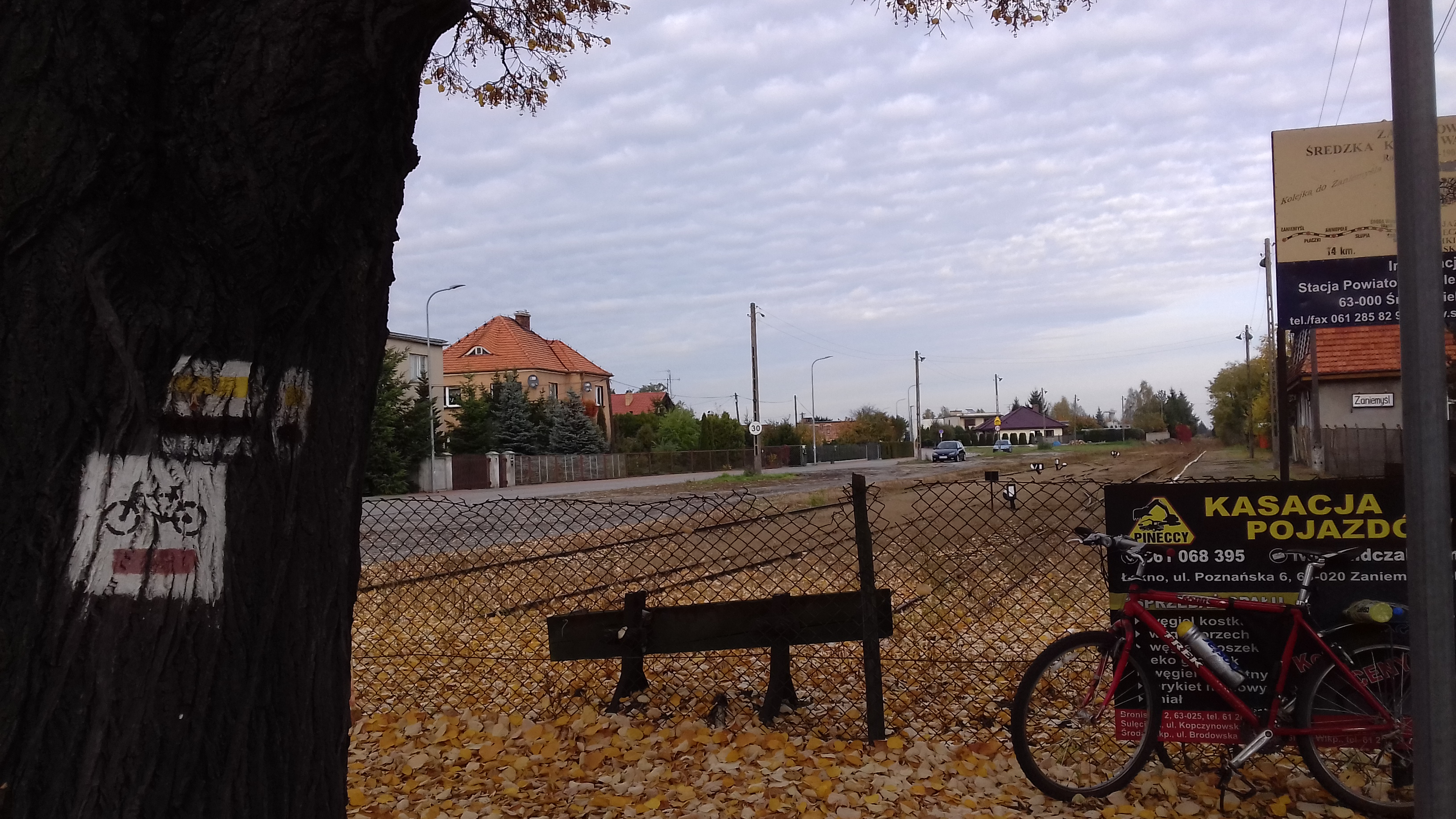 Oznaczenie końca pieszych szlaków turystycznych nr 3580 (czarnego) i nr 3581 (żółtego)